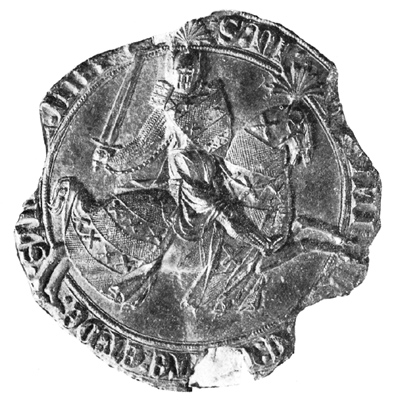 Zegel van Nicolaas III van Putten overl. 27-10-1311